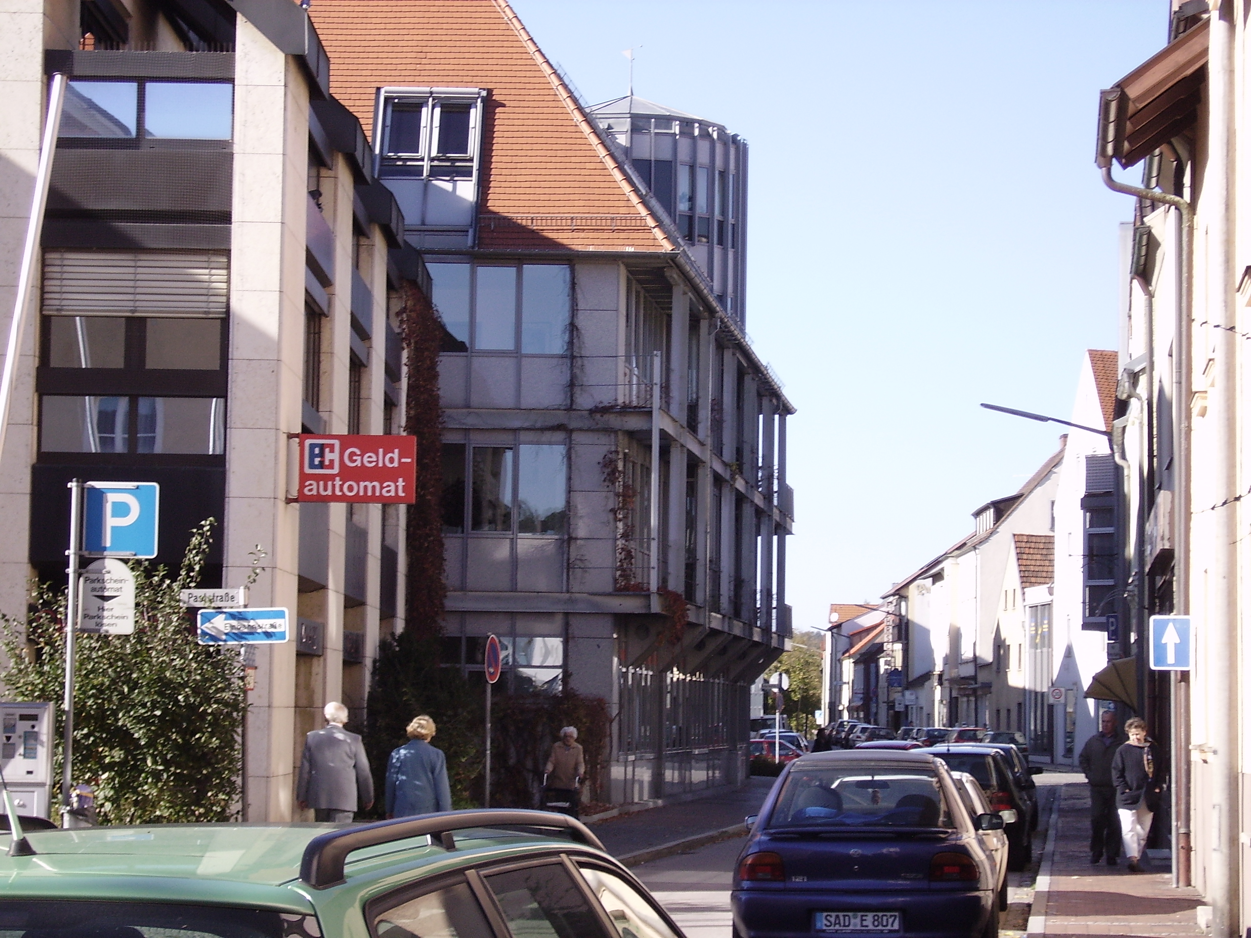 Beschreibung: Postgartenstraße in Schwandorf Quelle: Bild selbst erstellt Datum: 21. Dezember 2006 Autor: Midtown Manhattan